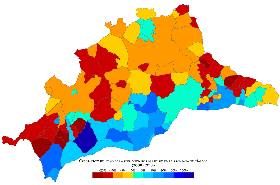 Crecimiento de la población por municipios en la provincia de Málaga entre los años 2008 y 2018